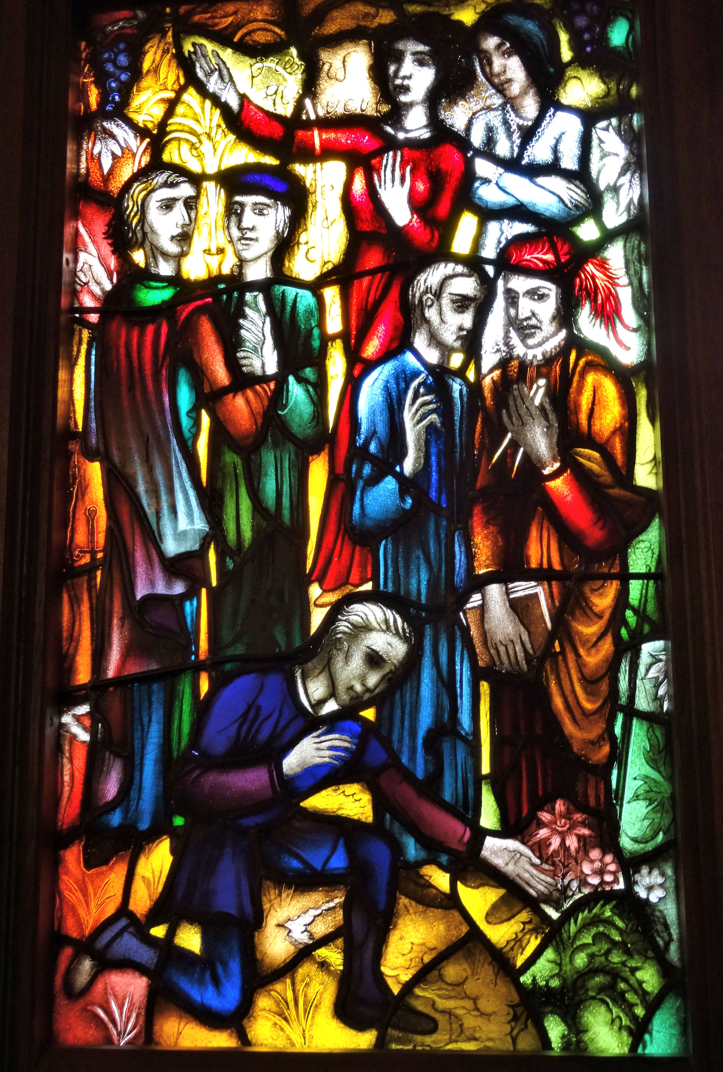 Detail raam V De moderne tijd. De vijf gedenkramen in de aula van het Academiegebouw in Groningen werden tussen 1937 en 1951 gemaakt door de kunstenaar Johan Dijkstra.